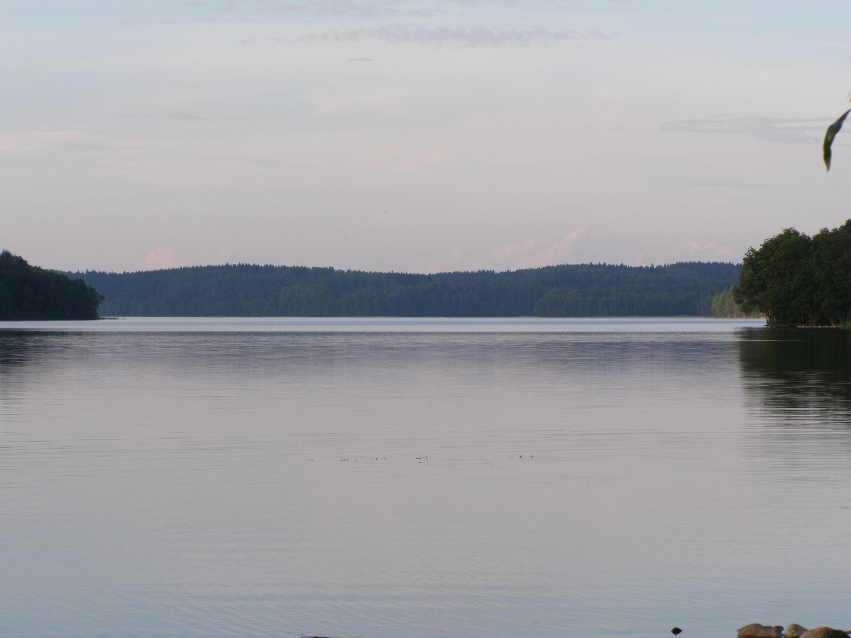 Hańcza